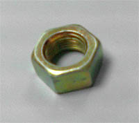 Цвет оцинкованной гайки после хроматирования меняется с серебристого на золотистый.